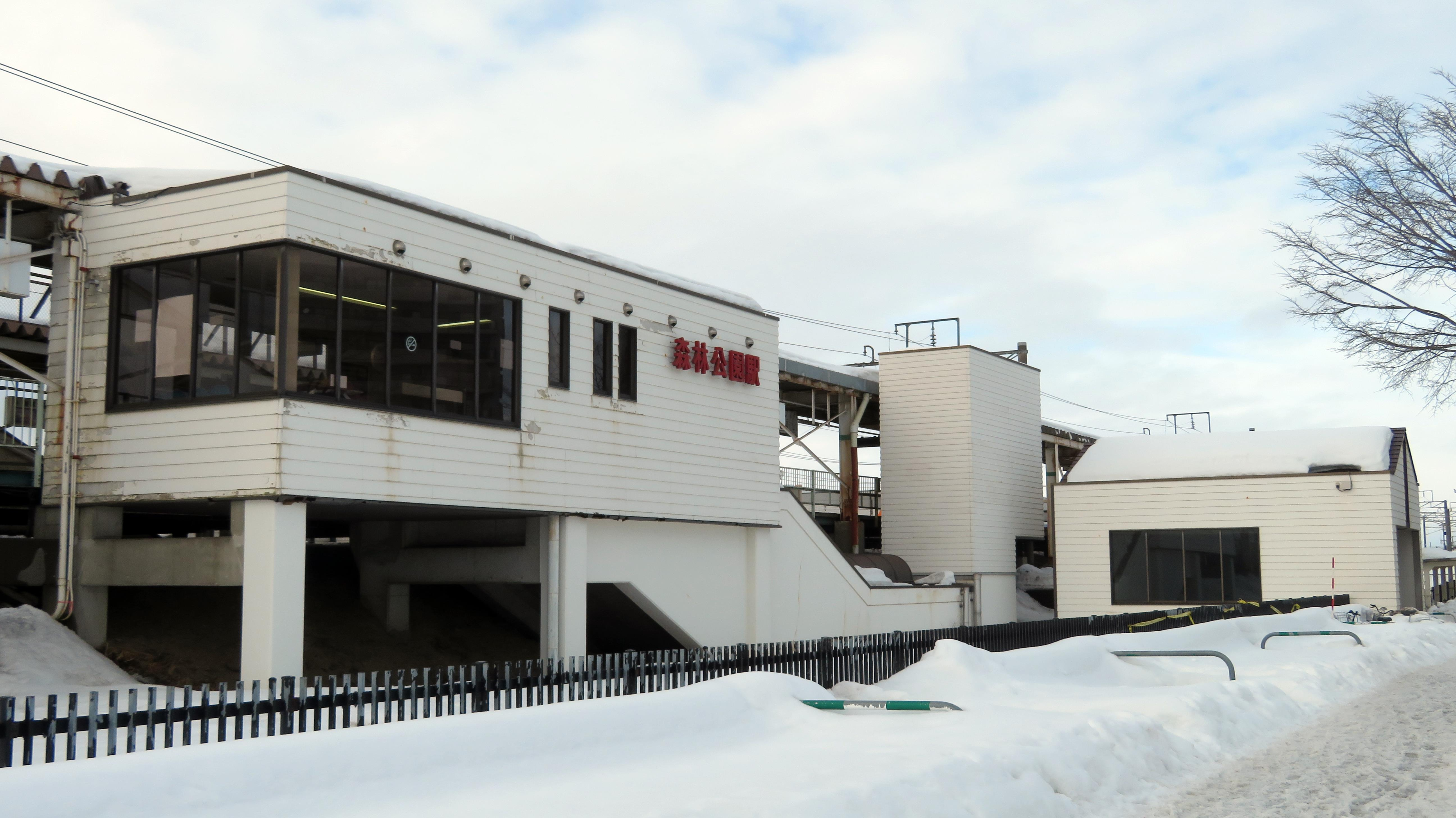 森林公園駅東口